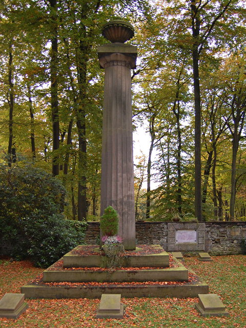 Freistehende Säule als zentrales Element der Erbbegräbnisstätte Schede, Herdecke This is a photograph of an architectural monument.